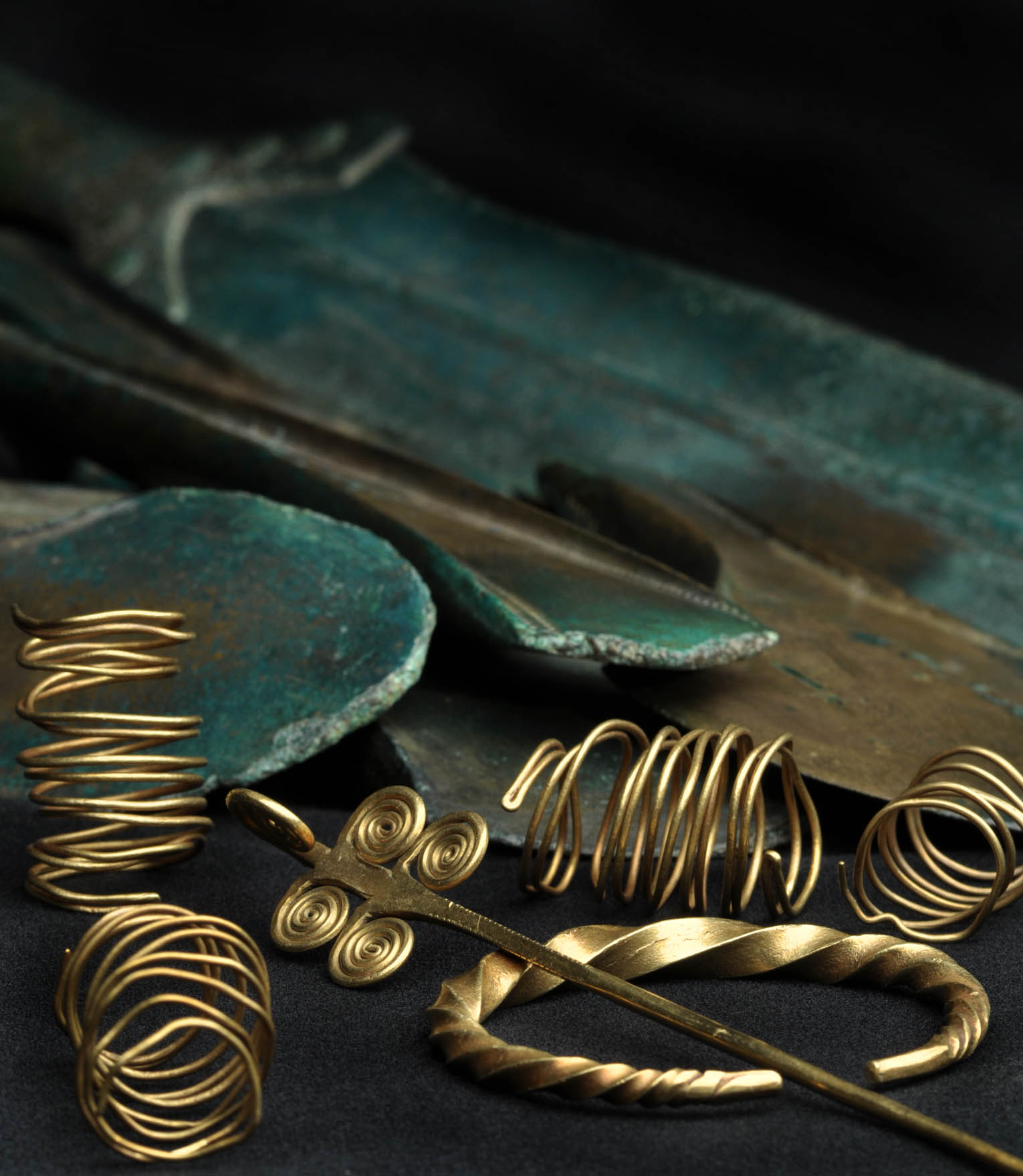 Bronzezeitlicher Hortfund aus Trassem: Beilklingen, ein Schwert und Schmuck aus Gold wurden um 1600 Jahre vor Christus zwischen Steinen versteckt